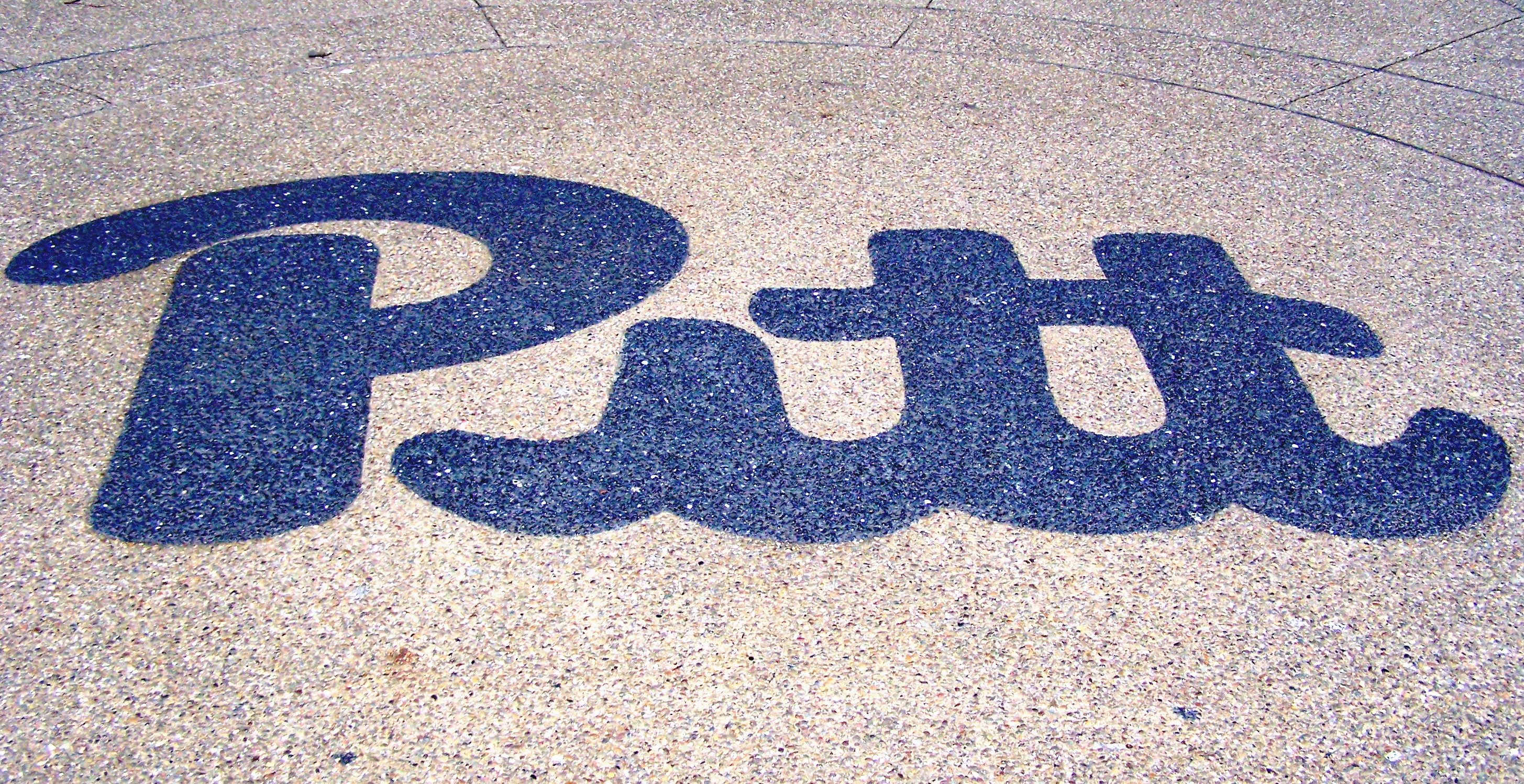 Pitt Student Union